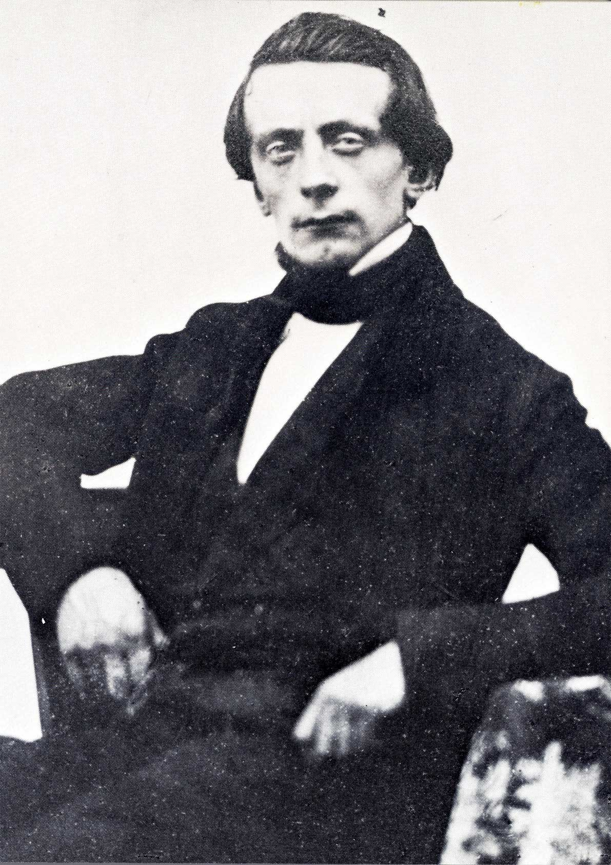 Fotoportret van Gijsbert Johannes Verspuy (1823-1862)